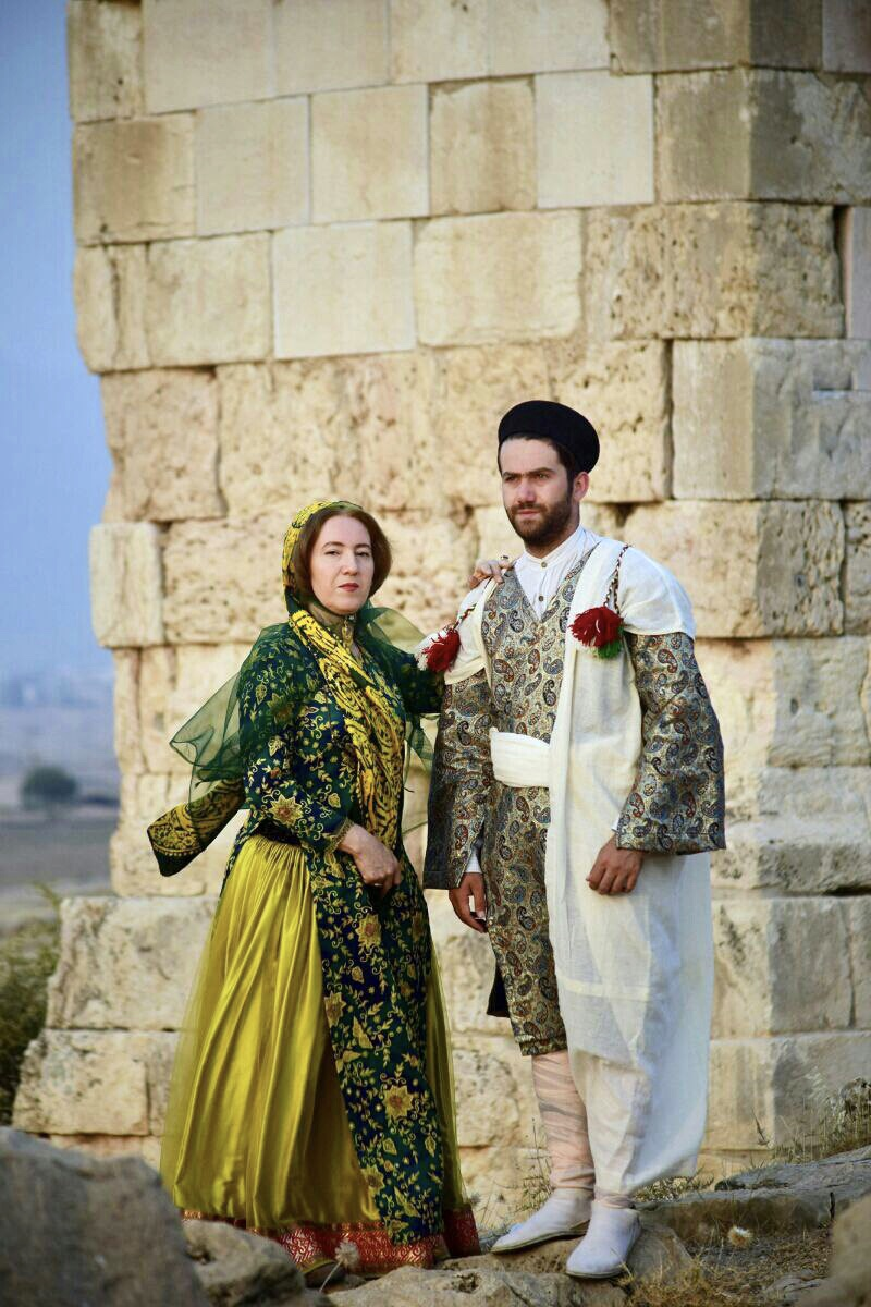 Southern Lurish Female and Male Costumes